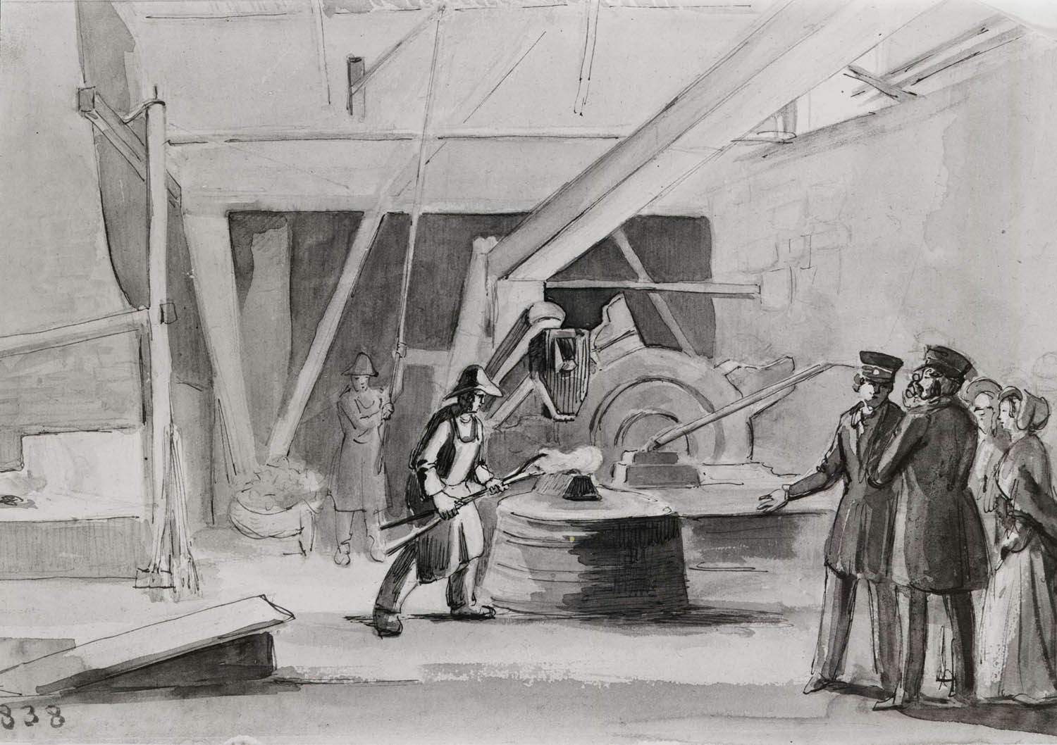 depicted place: Uppland, Olands hd, Skäfthammar, Gimo bruk (Sverige (SE))